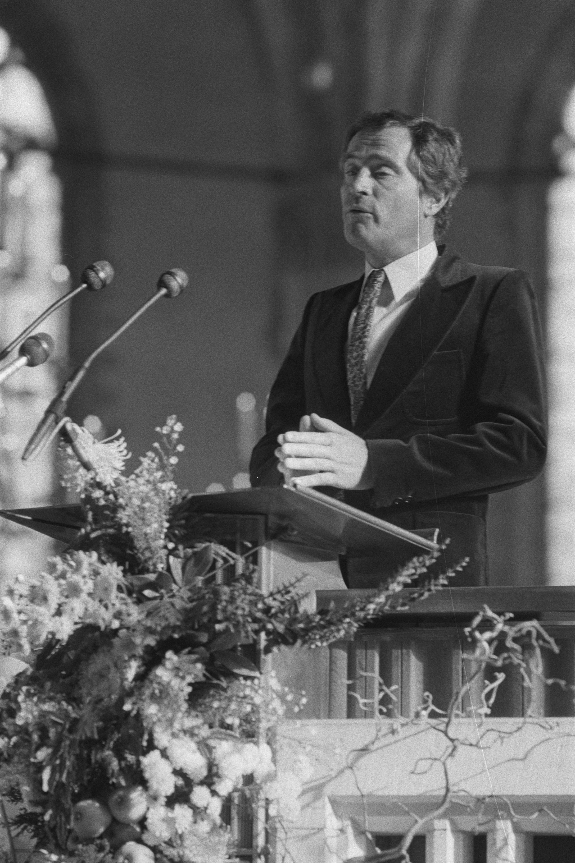 Collectie / Archief : Fotocollectie Anefo Reportage / Serie : [ onbekend ] Beschrijving : Uitreiking Erasmusprijs aan Tsjechische toneelschrijver en essayist Václav Havel door prins Bernhard; toespraak door professor Jan Triska [Tryska] Annotatie : Havel zelf is niet aanwezig omdat hij zijn land niet wilde verlaten Datum : 13 november 1986 Trefwoorden : toespraken, toneelschrijvers Persoonsnaam : Tryska, J. Fotograaf : Croes, Rob C. / Anefo, [onbekend] Auteursrechthebbende : Nationaal Archief Materiaalsoort : Negatief (zwart/wit) Nummer archiefinventaris : bekijk toegang 2.24.01.05 Bestanddeelnummer : 933-8140